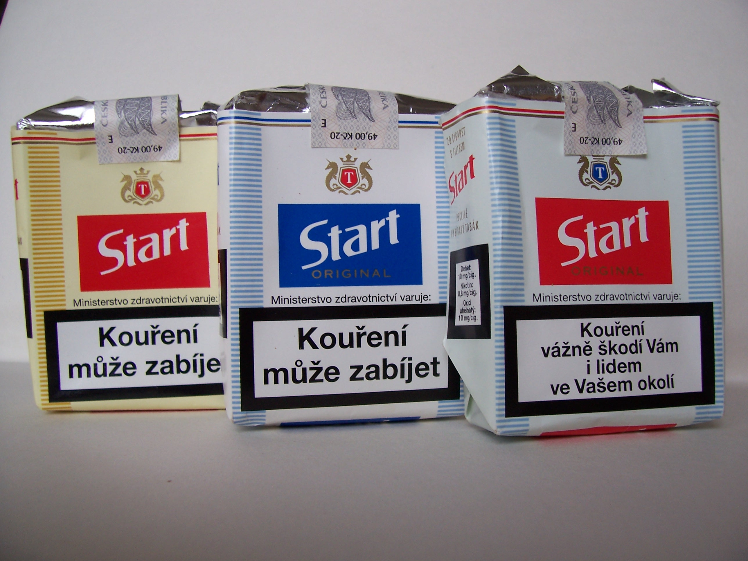 Základní řada cigaret Start, 2010